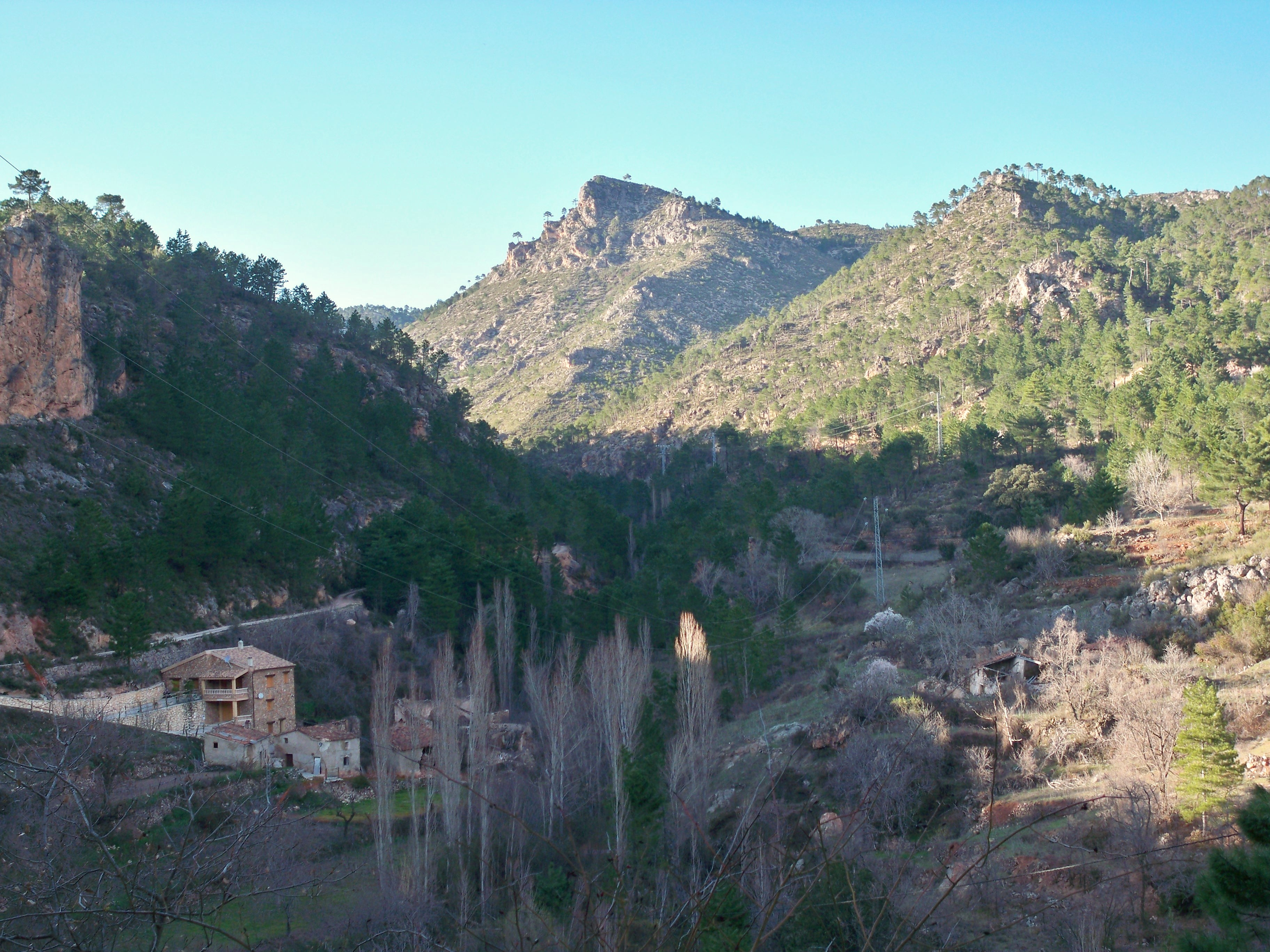 Vista de la Sierra del Segura desde El Quqjigal (Molinicos - Albacete)